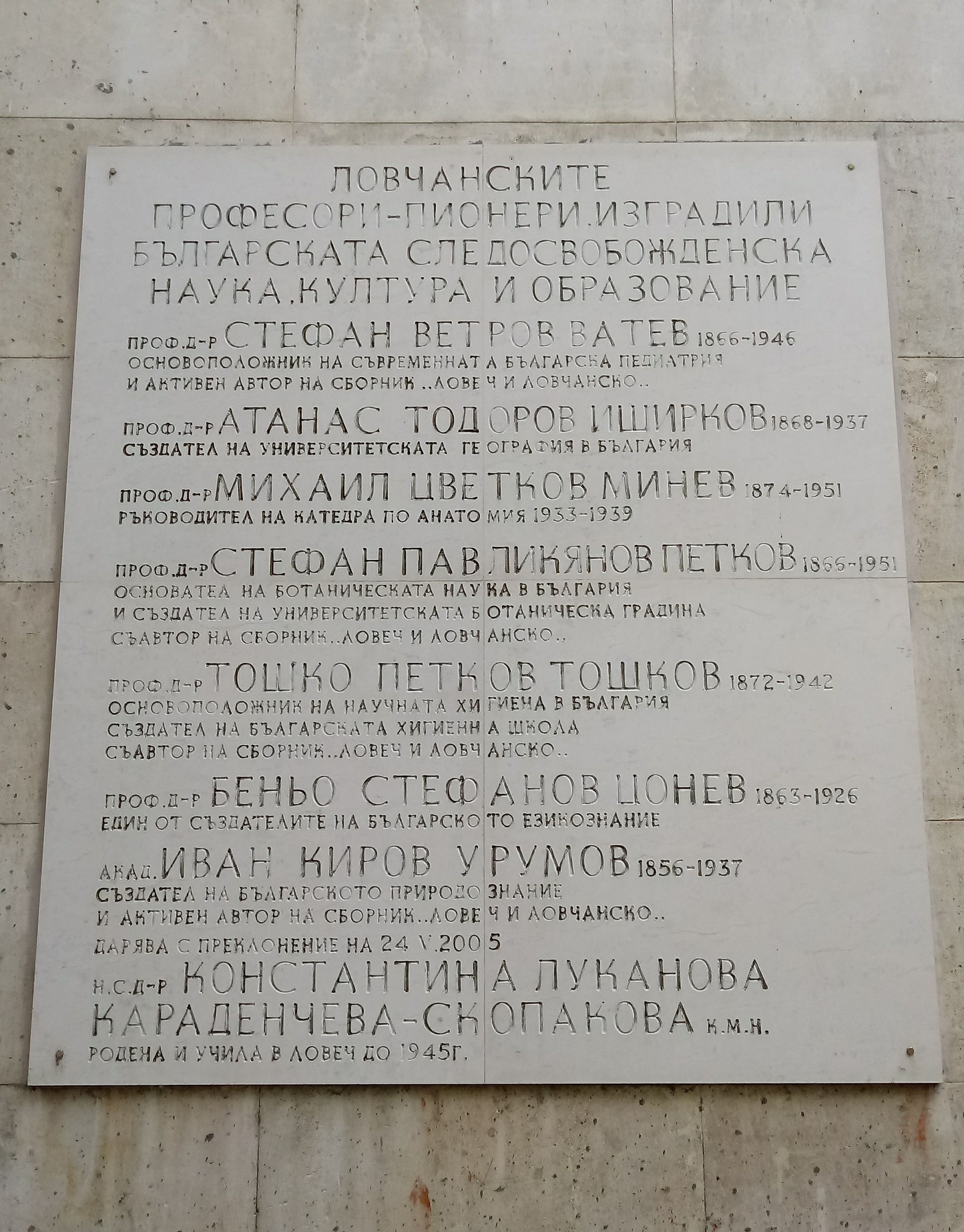 Lovech professors memorial plaque